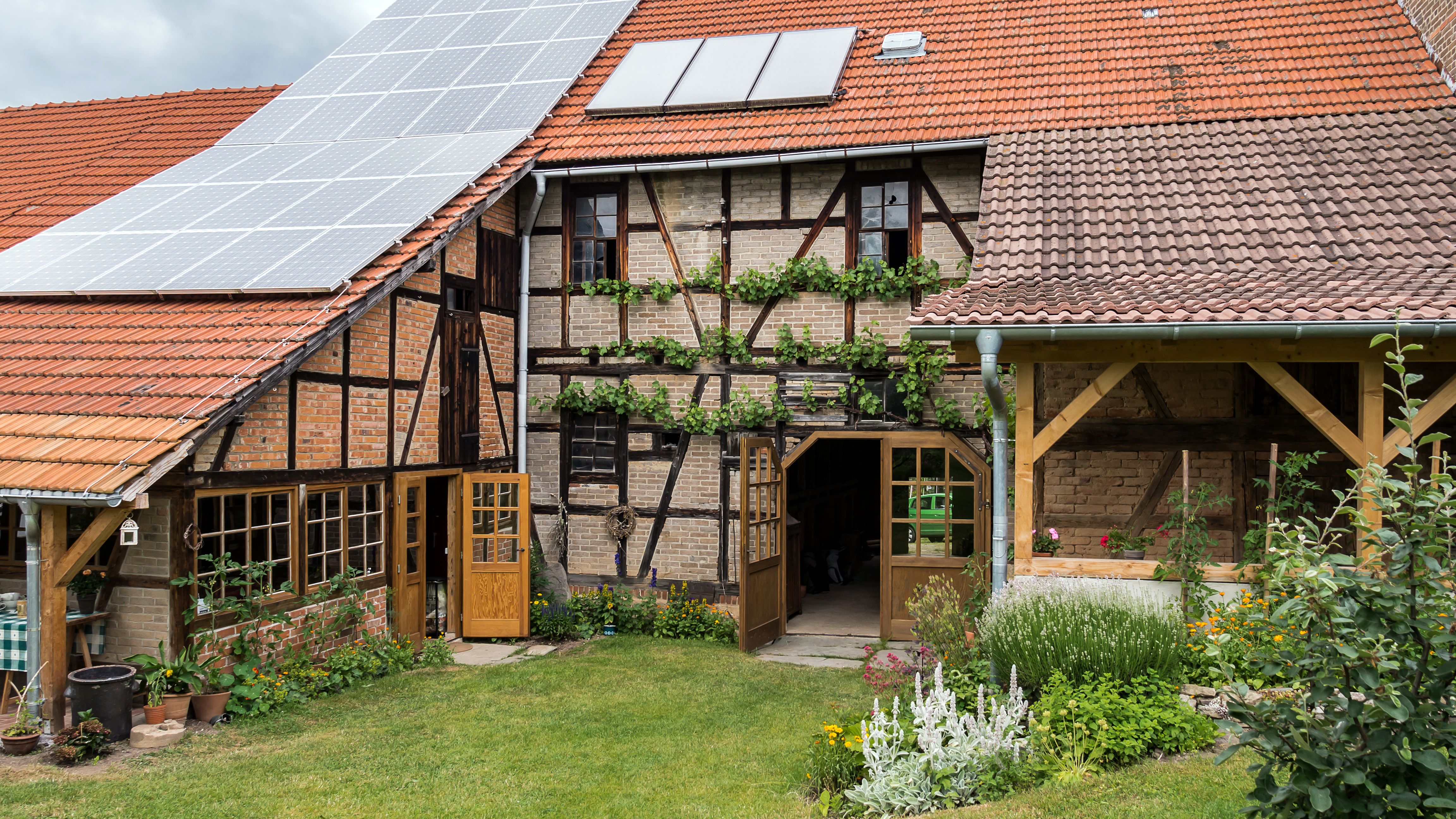 Bechstedt Ortsstraße 19 Kulturscheune